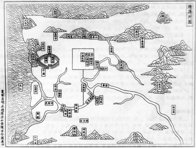 ，蒋州地图，复制自明朝陈沂所著《金陵古今图考》。